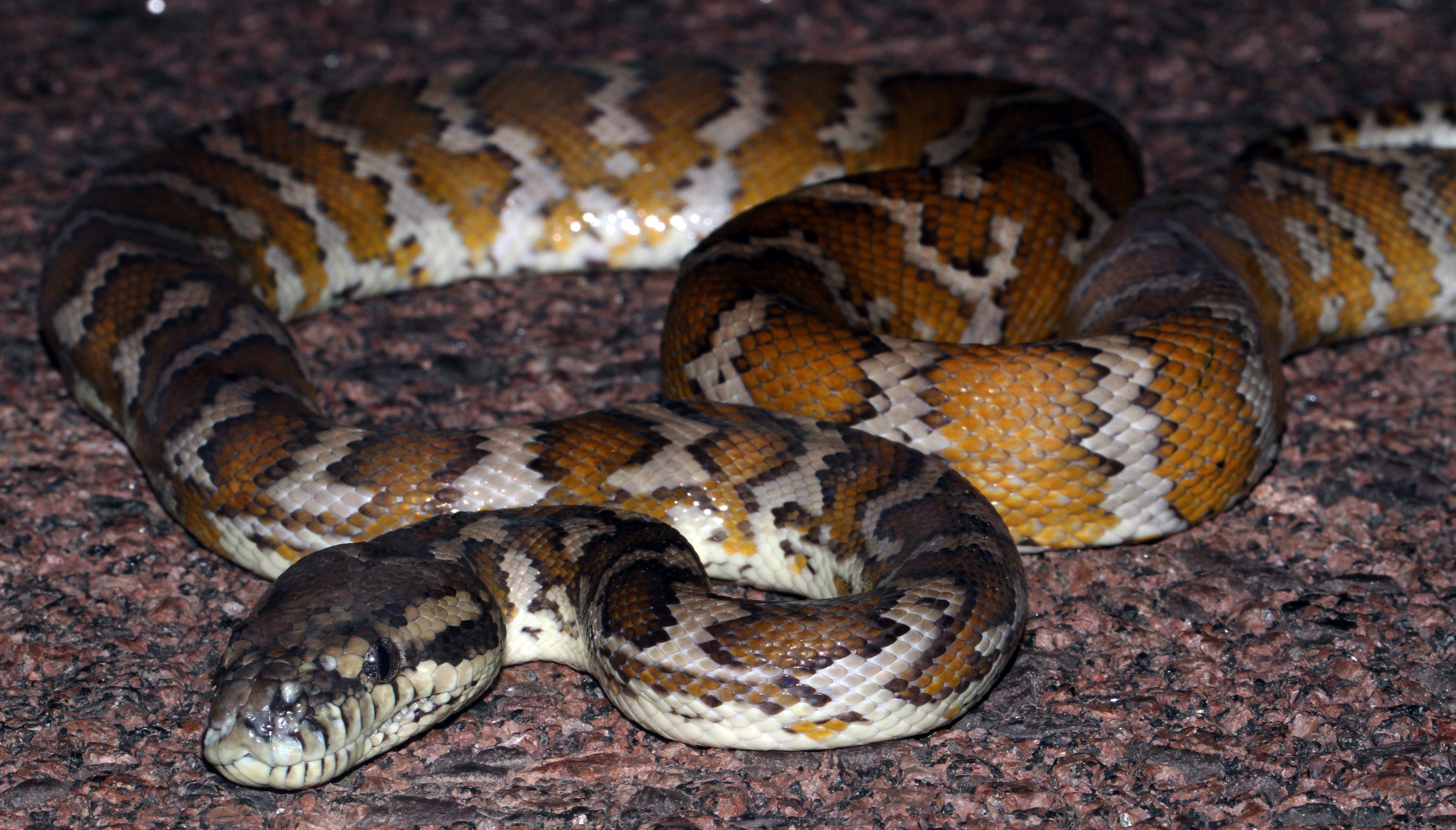 Kakadu NT.